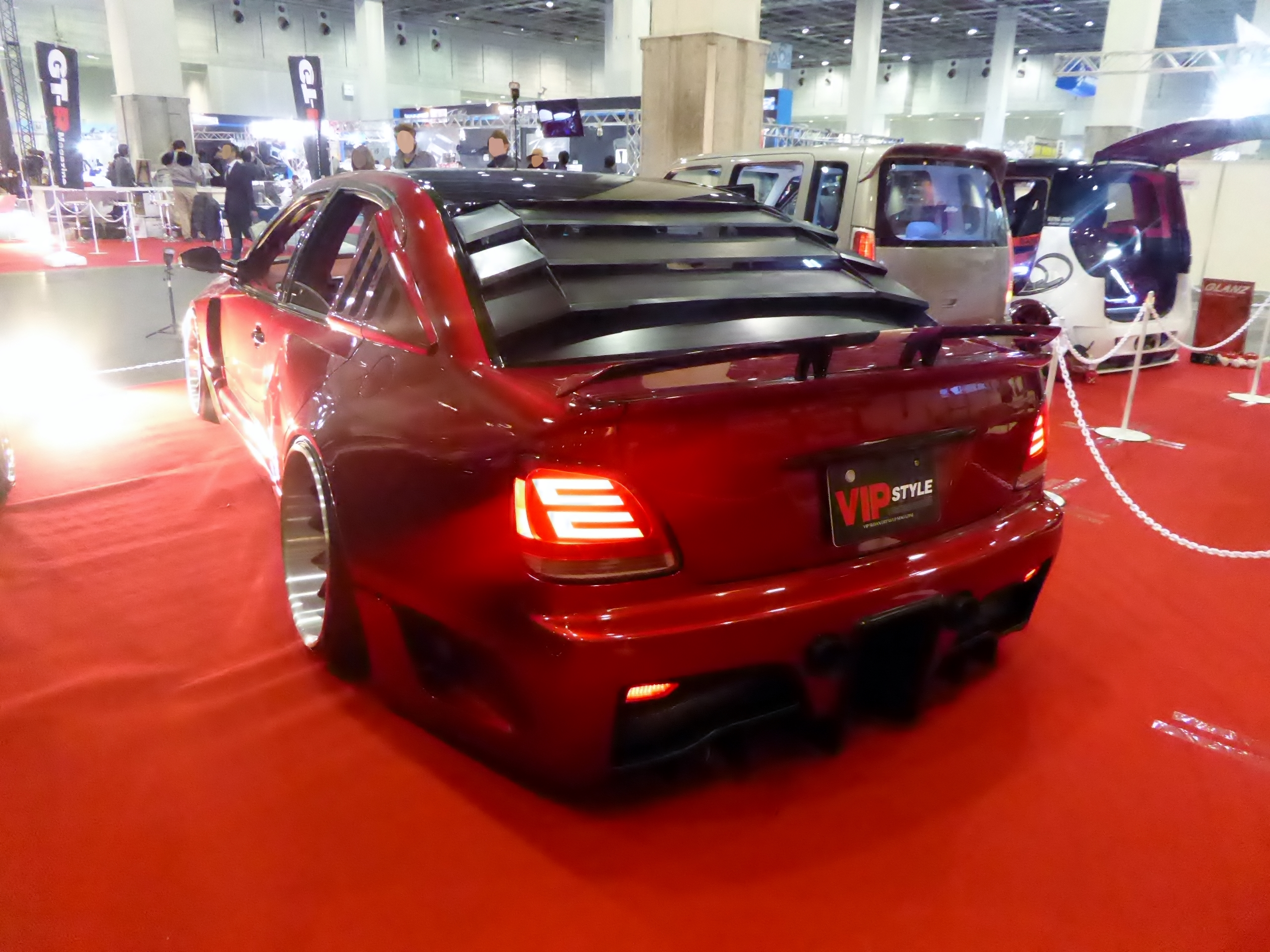 大阪オートメッセ2016においてVIP STYLEが出展するJZS160系トヨタ・アリストを撮影。